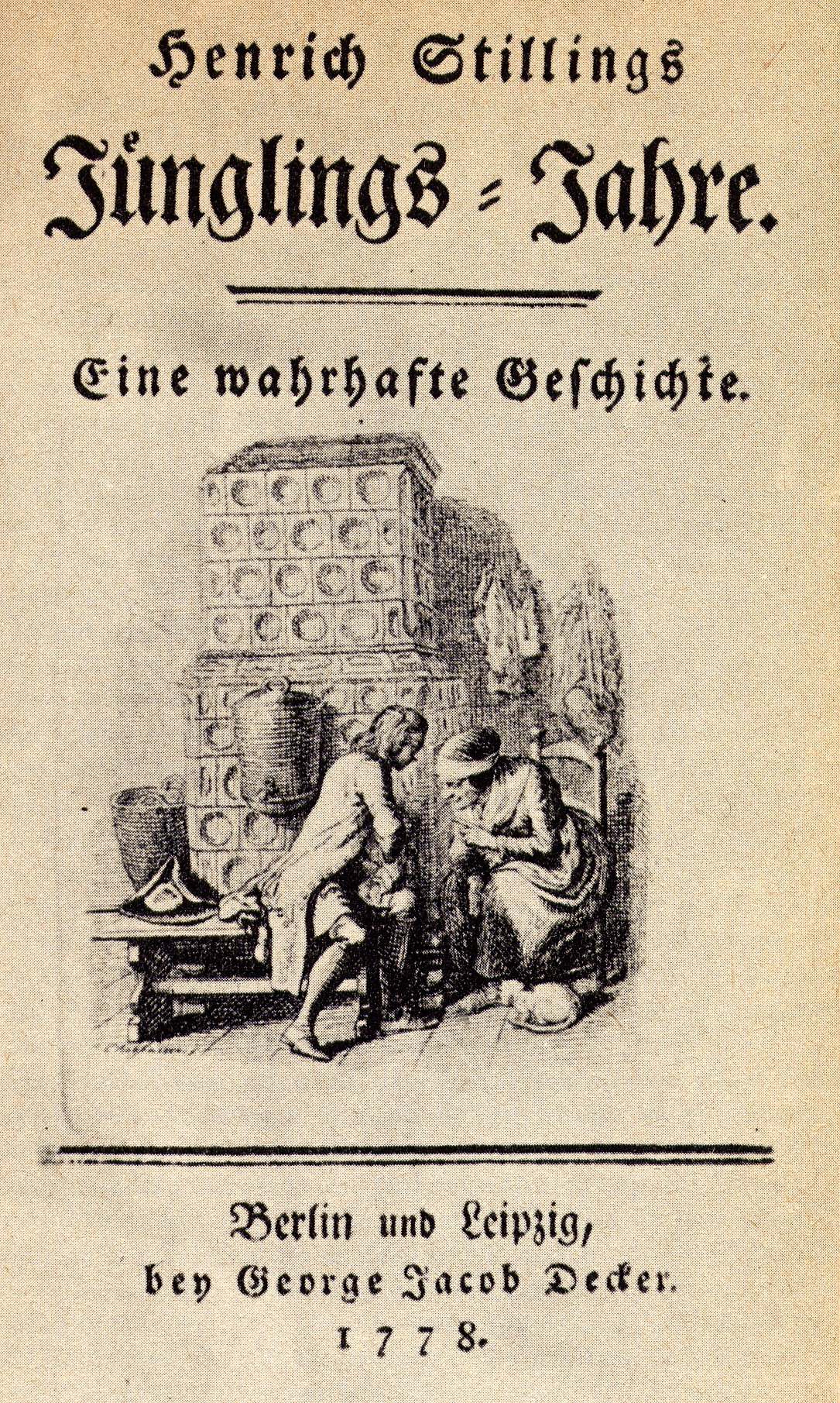 Titelbild: Henrich Stillings Jünglings-Jahre. Eine wahrhafte Geschichte. Berlin und Leipzig bey George Jacob Decker 1778